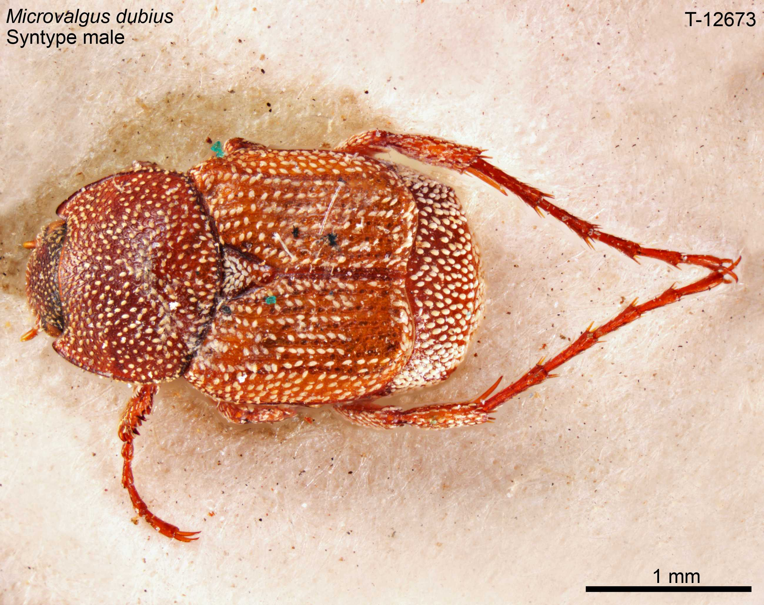 Microvalgus dubius, syntype